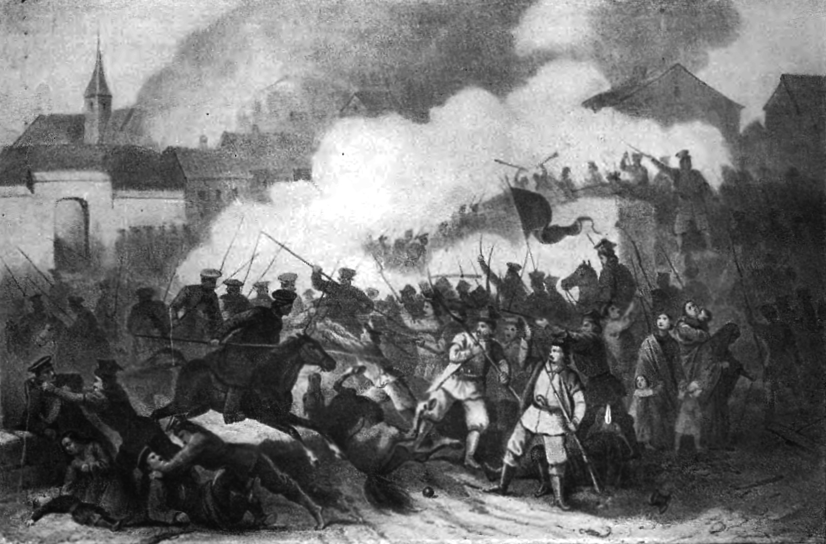 Battle of Siemiatycze 1863